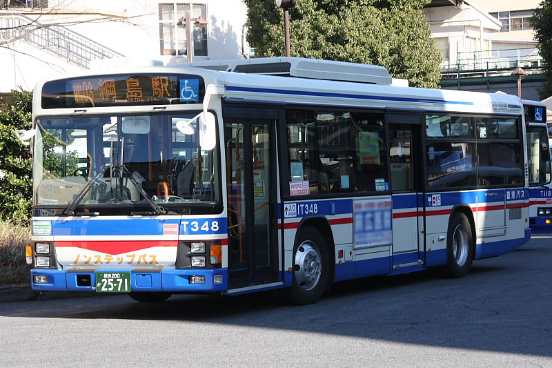 Kawasaki Tsurumi Rinko Bus's route bus (Car No.1T348 / Isuzu Erga PKG-LV234L2 / J-BUS body) at Tsurumi Station West Exit, Tsurumi-ku, Yokohama, Kanagawa, Japan